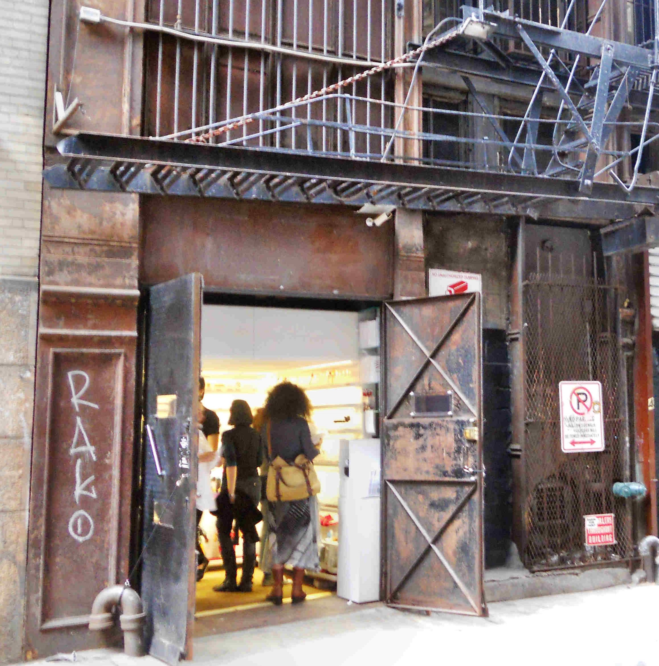 Blick auf Eingang und Besucher des mmuseumms 2014